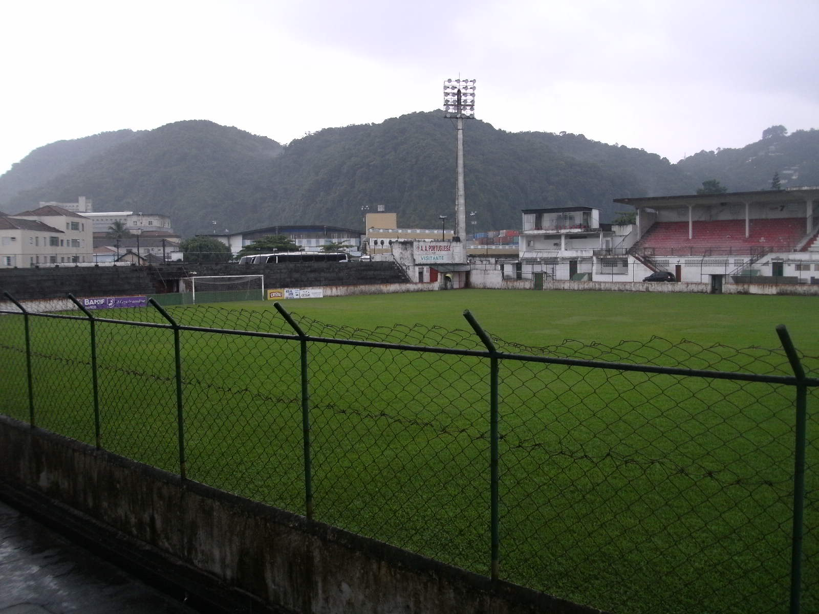 Patinhas Esteve Aqui - Estadio da Portuguesa Santista 3